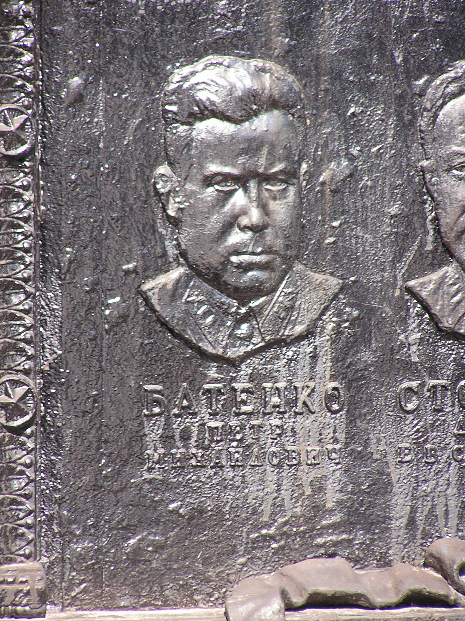 Донецк. Батенко